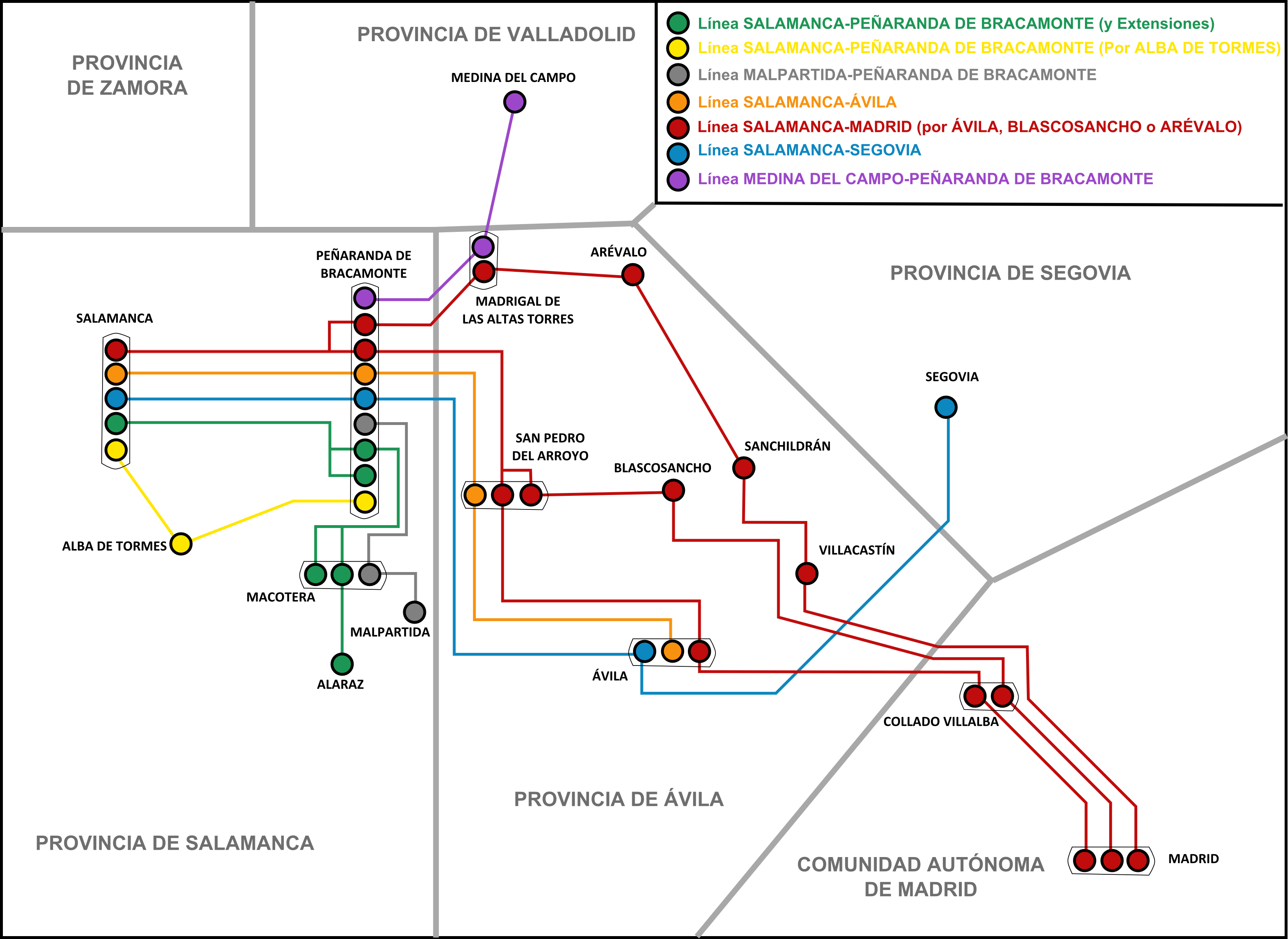 Líneas de autobuses activas desde Peñaranda de Bracamonte (actualizado a Agosto de 2014)